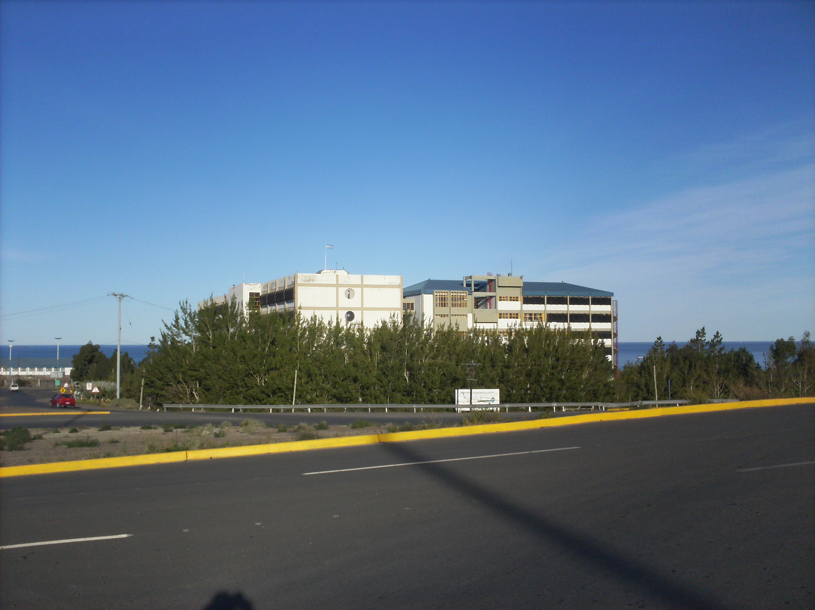 VISTA DESDE EL INTERCAMBIADOR DE LA UNPSJ